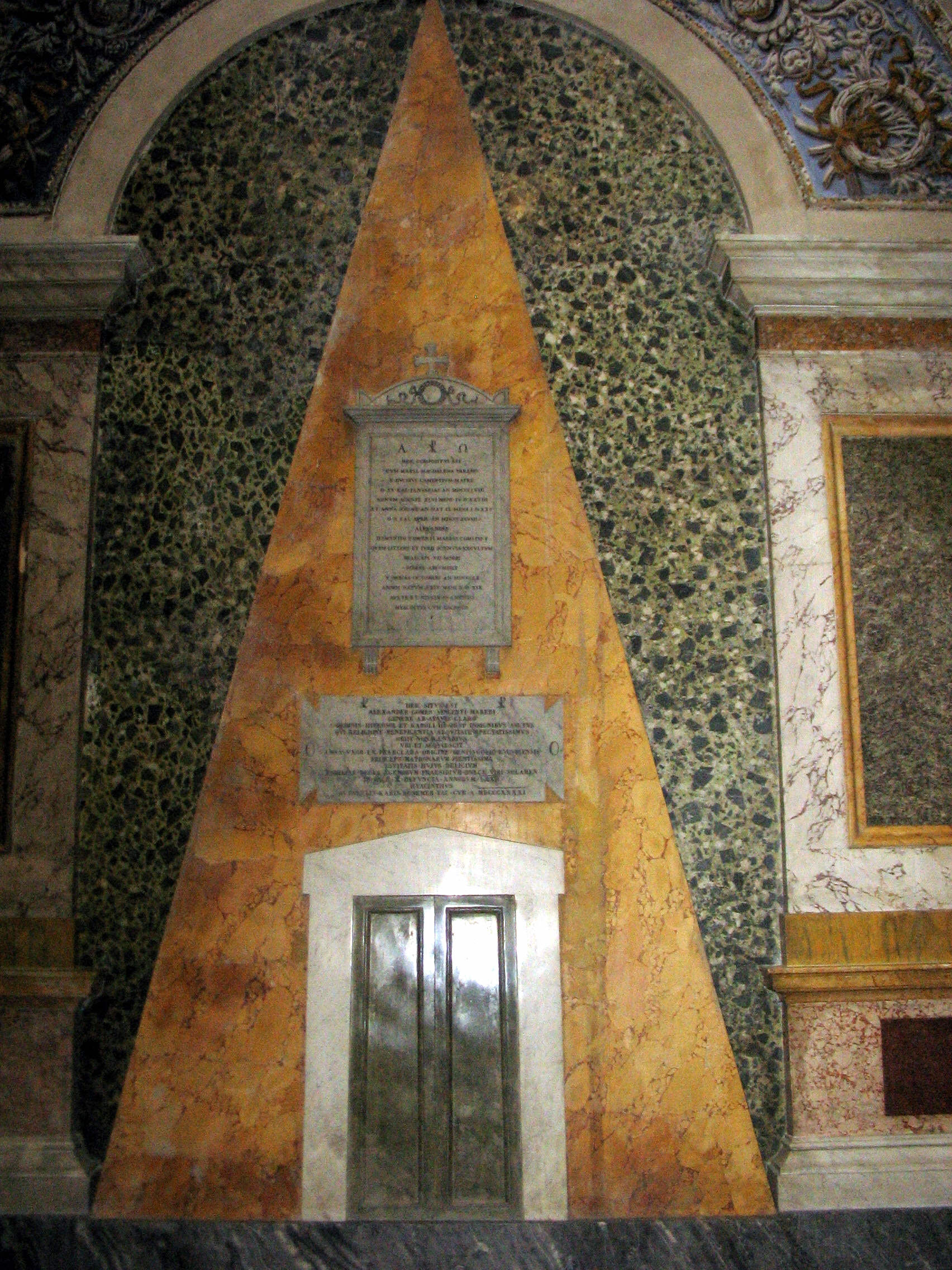 Rieti, Lazio, Italia